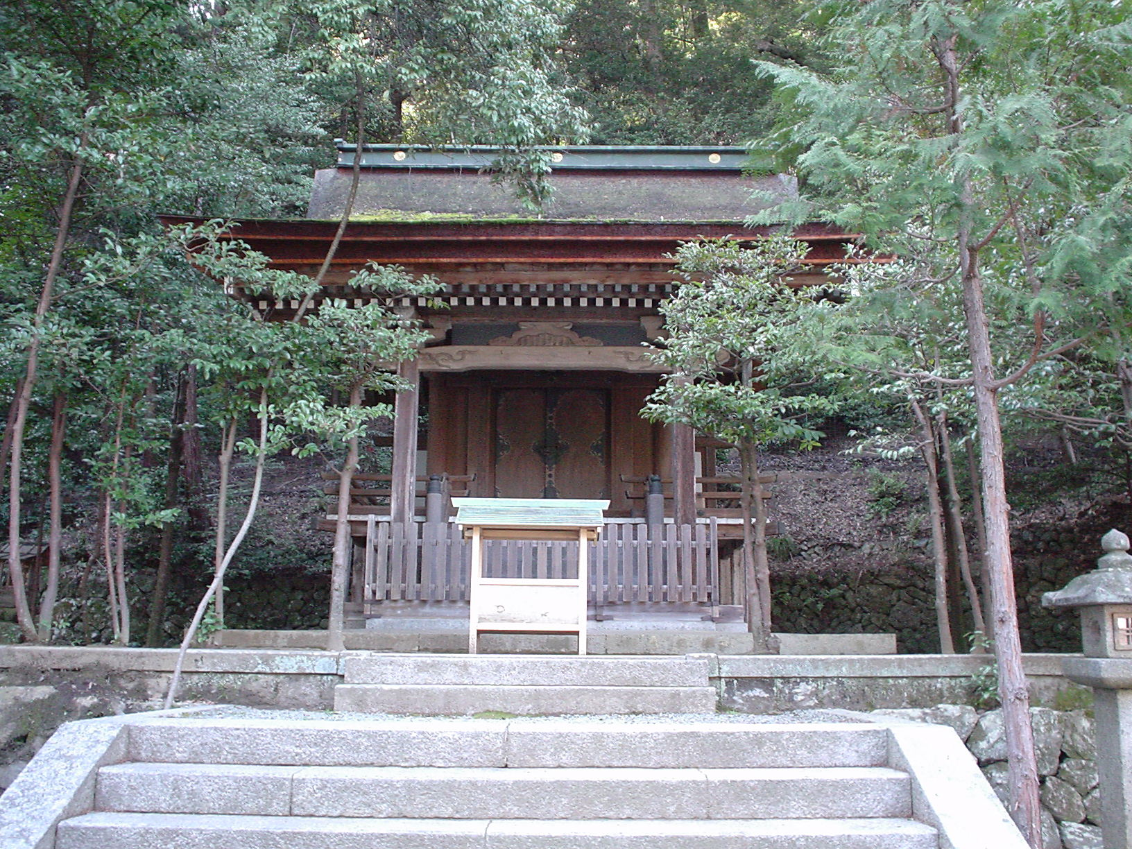 京都・松尾大社摂社 月読神社 Tsukuyomi shrine, Kyoto, Japan 2006-03-05